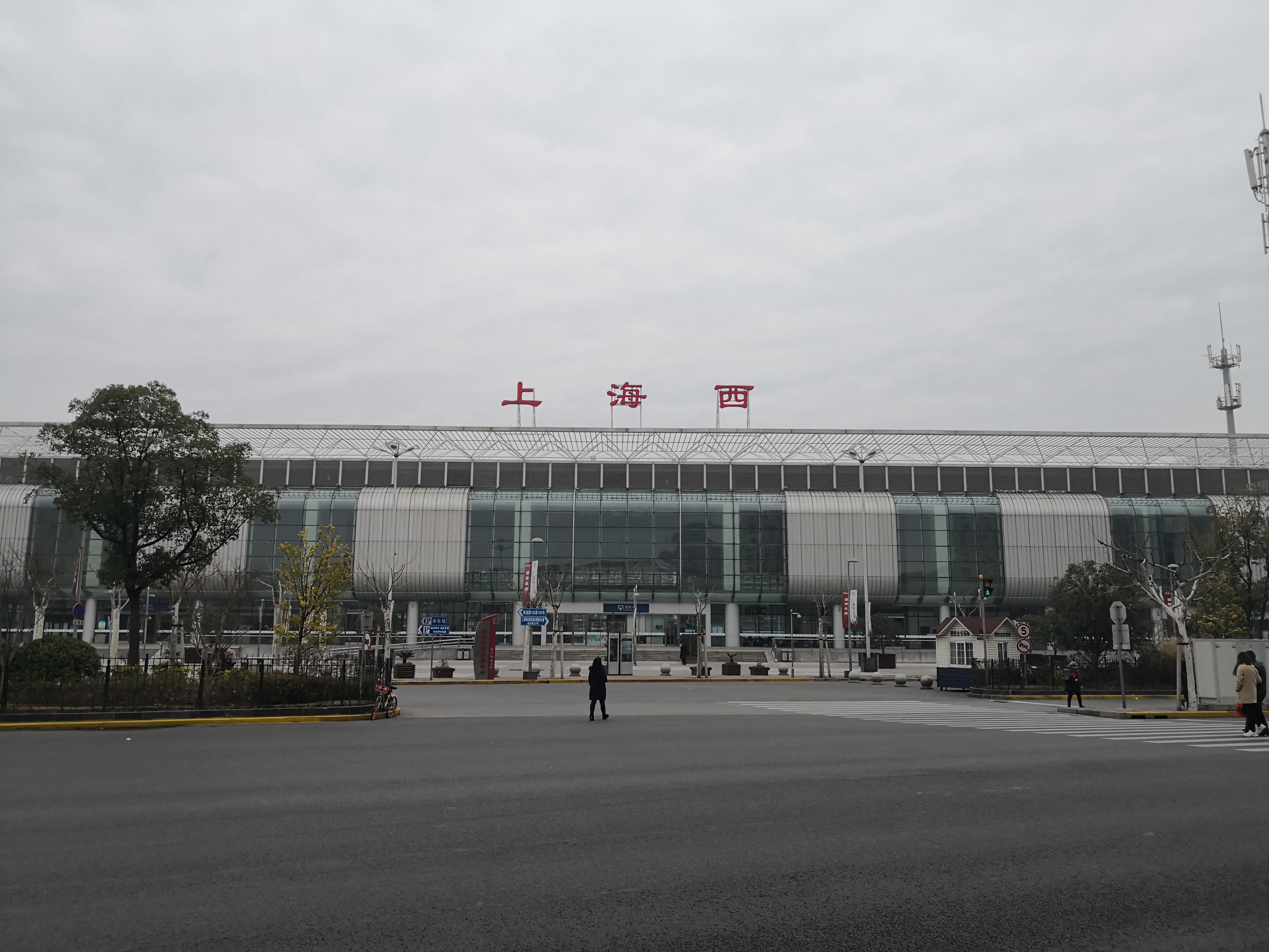 上海西站南广场